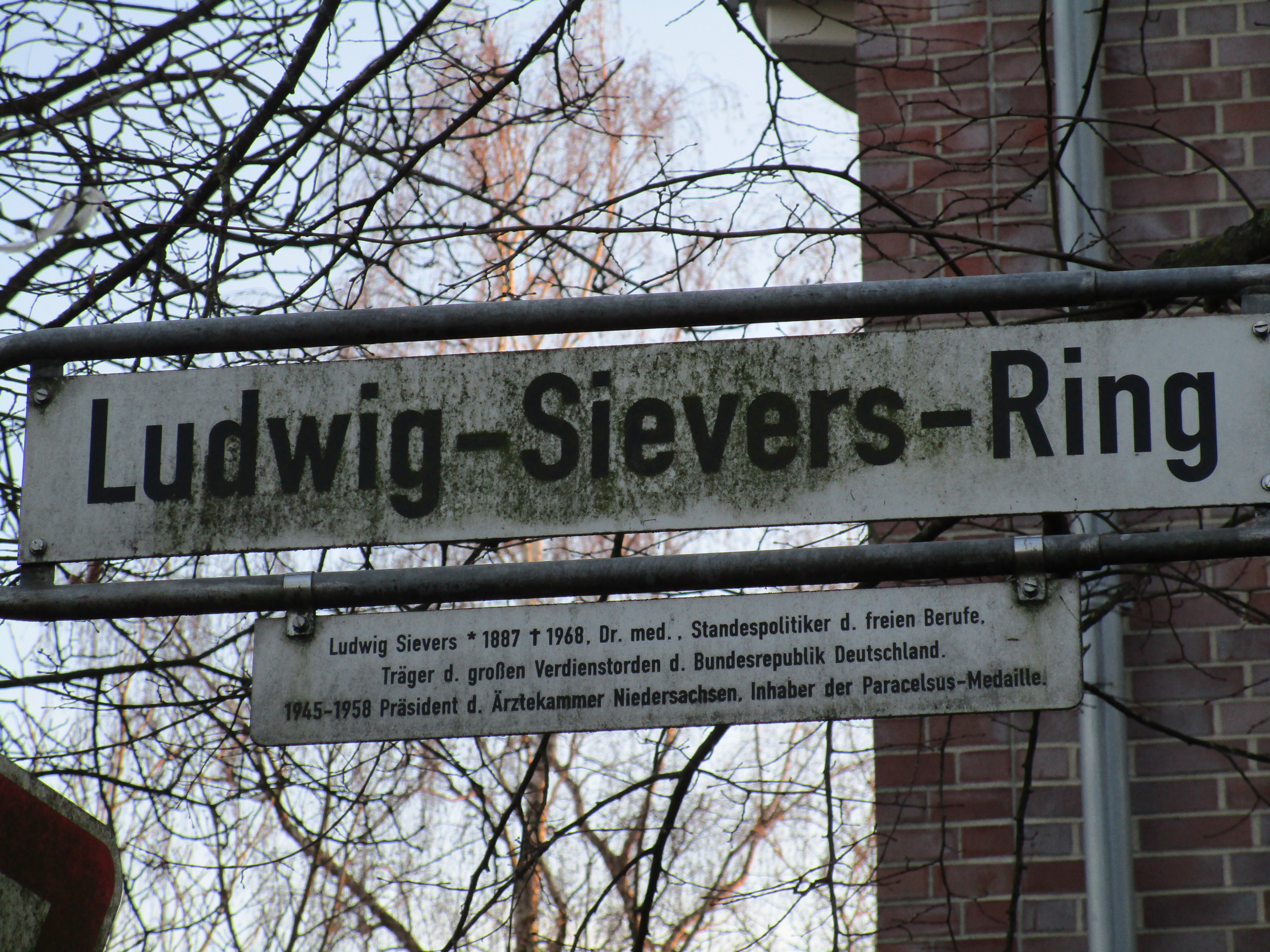 Der Ludwig-Sievers-Ring im Stadtteil Bothfeld …